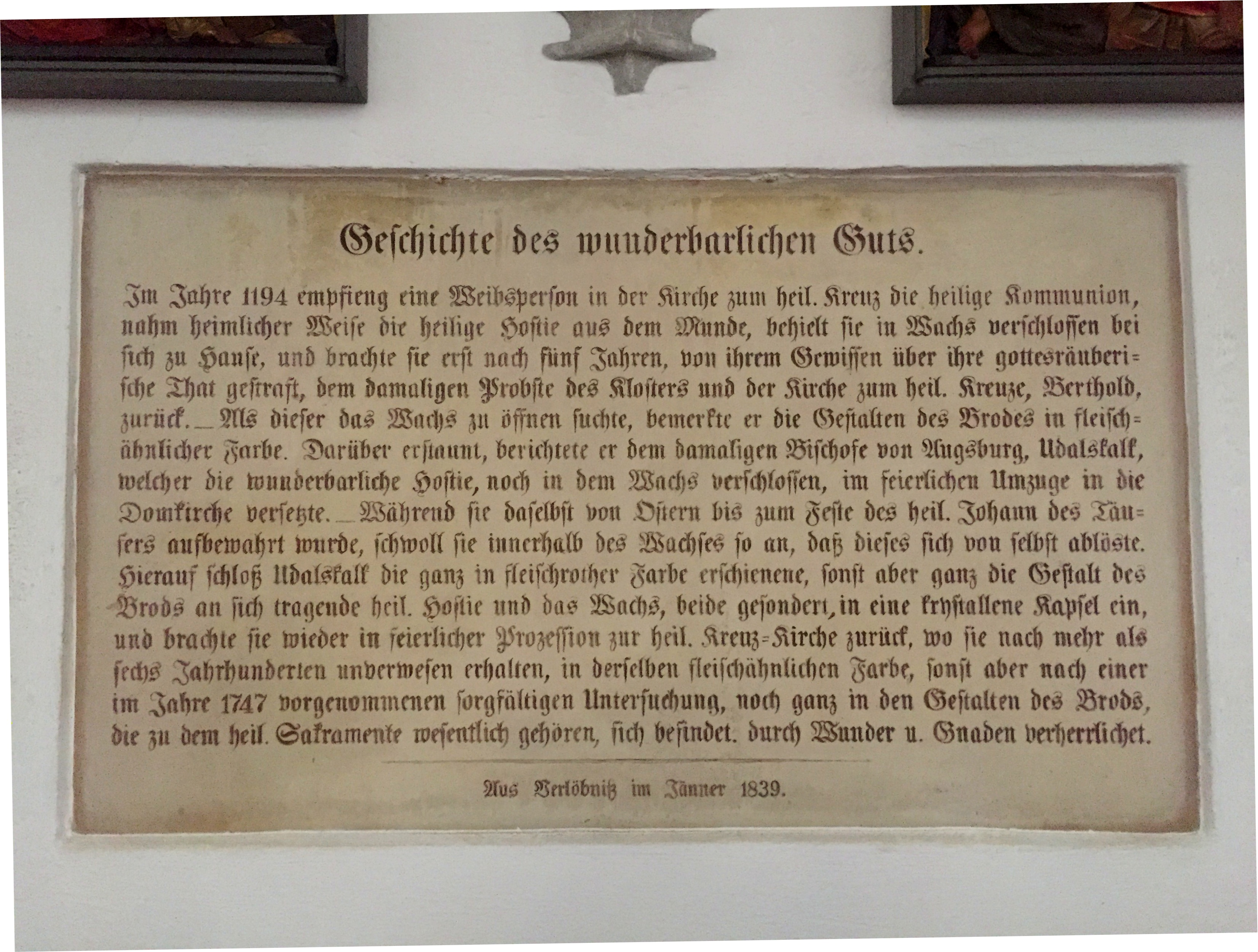 Inschrift von 1839 über das "Wunderbarliche Gut" (Hostienwunder) in der Katholischen Heilig-Kreuz-Kirche Augsburg.